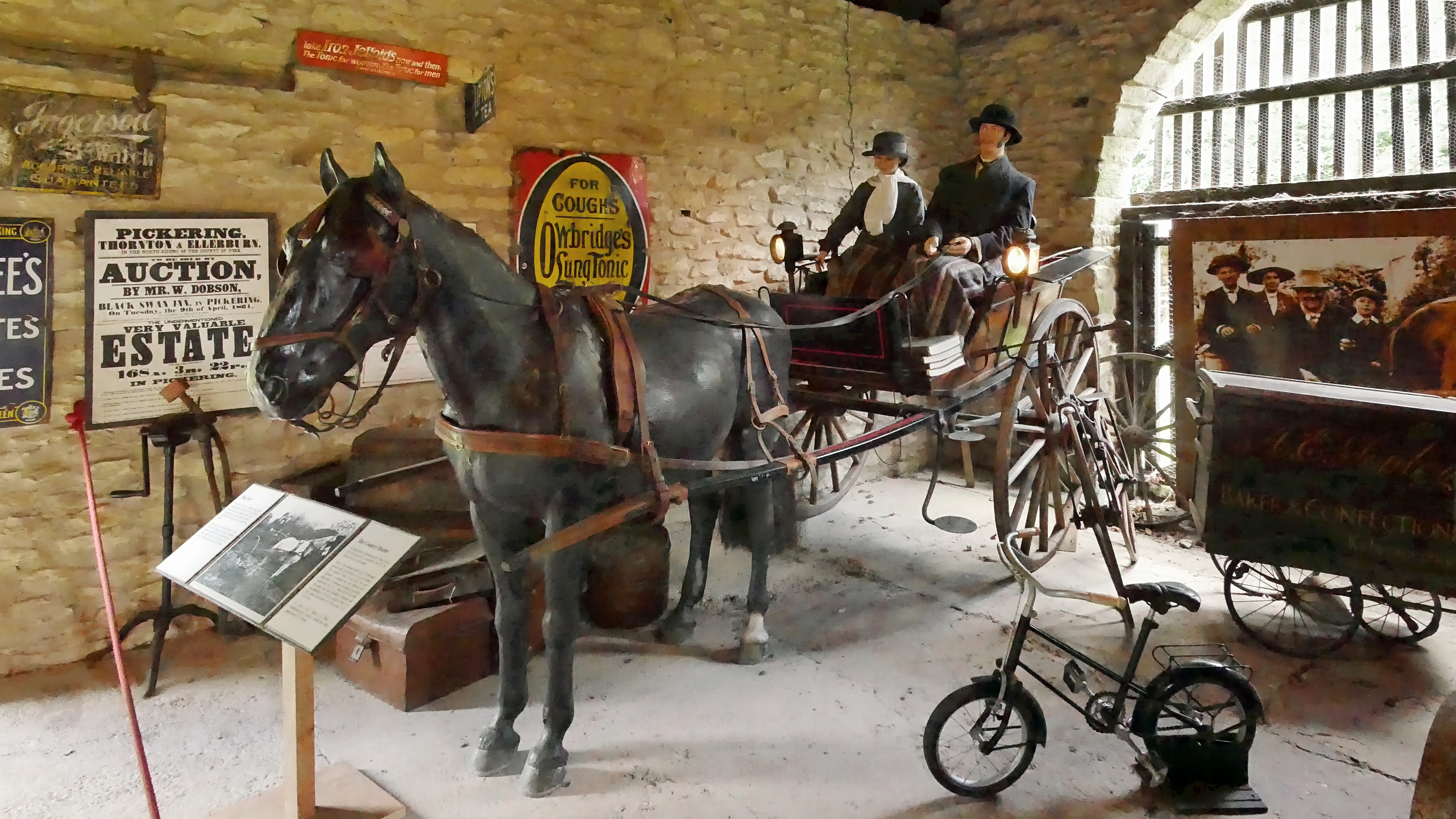 Ryedale Folk Museum - manor house